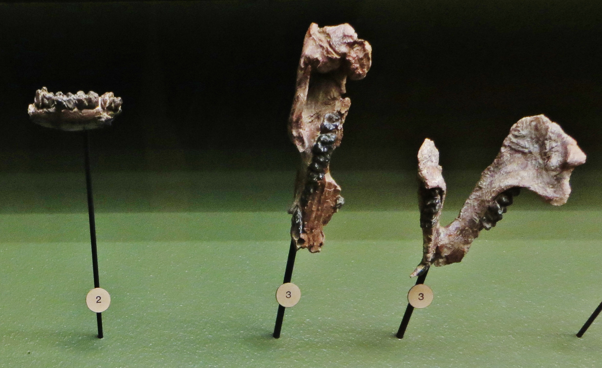 Fossil of Palaeochoerus - Took the picture at Natural History Museum, Basel